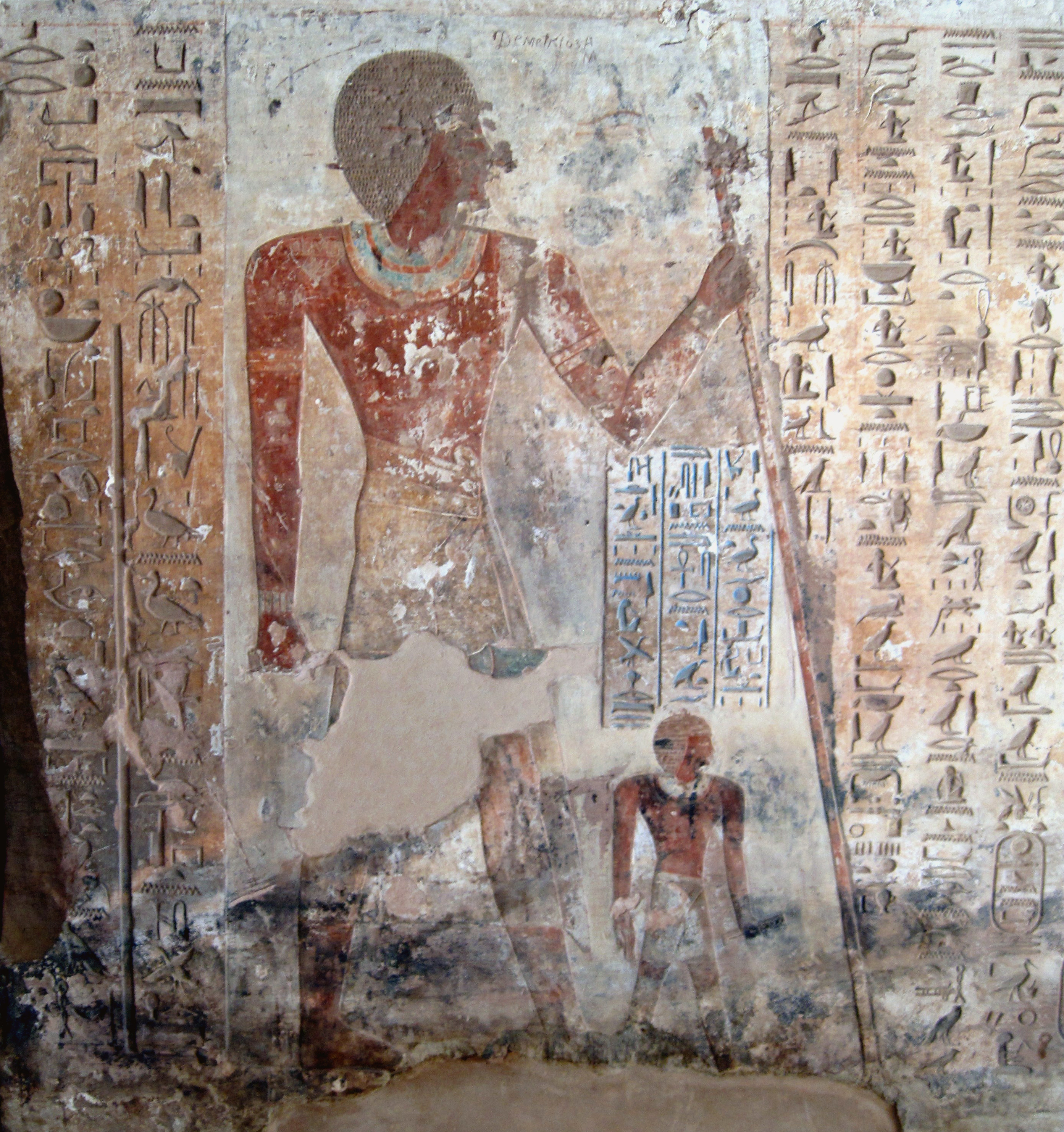 Felsengrab des Ahmose, Sohn der Ibana, unter den Felsengräbern des altägyptischen Necheb bei el-Kab, Ägypten